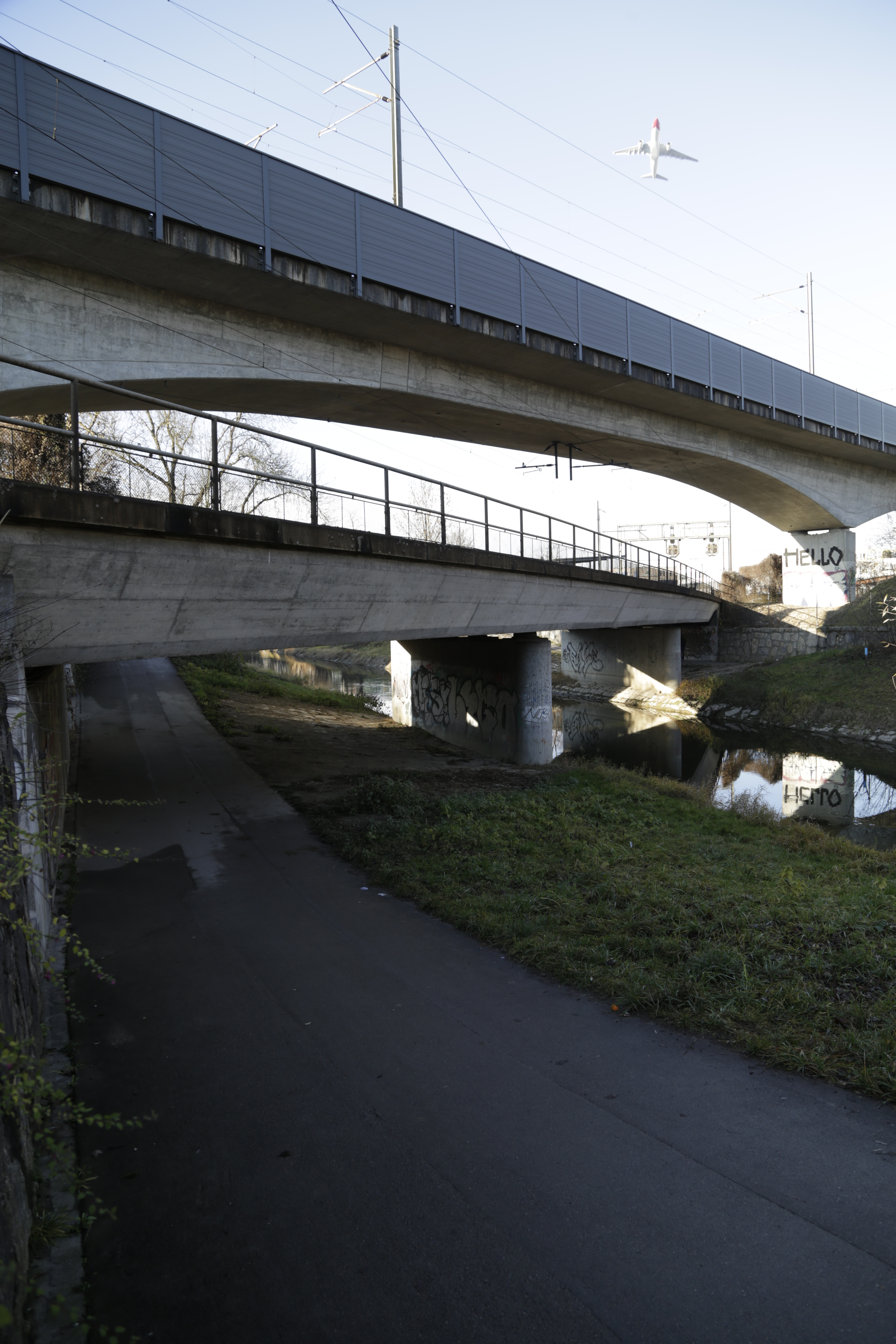 In Opfikon überqueren übereinader zwei SBB Strecken die Glatt. Wobei sie sich genau über der Glatt kreuzen. Unten führt die Strecke von Zürich Oerlikon über Flughafen nach Effretikon über Glattbrücke. Darüber liegt die Bahnstrecke von Zürich Oerlikon/Zürich Seebach über Kloten nach Effretikon, welche mit dem Glattviadukt, die Flughafenlinie und Glatt überquert.